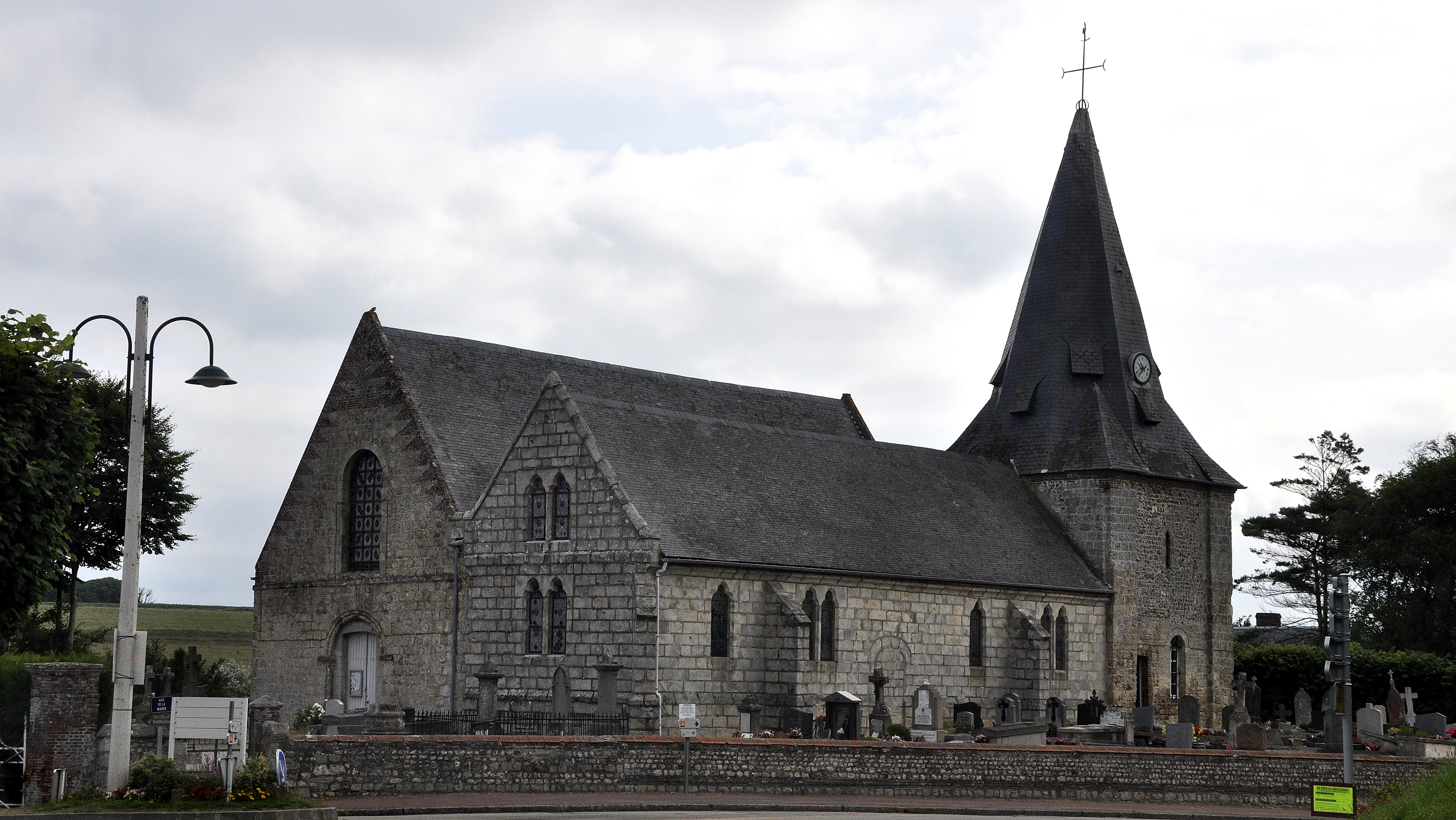 De kerk van Saint-Aubin-sur-Mer (Seine-Maritime), Frankrijk